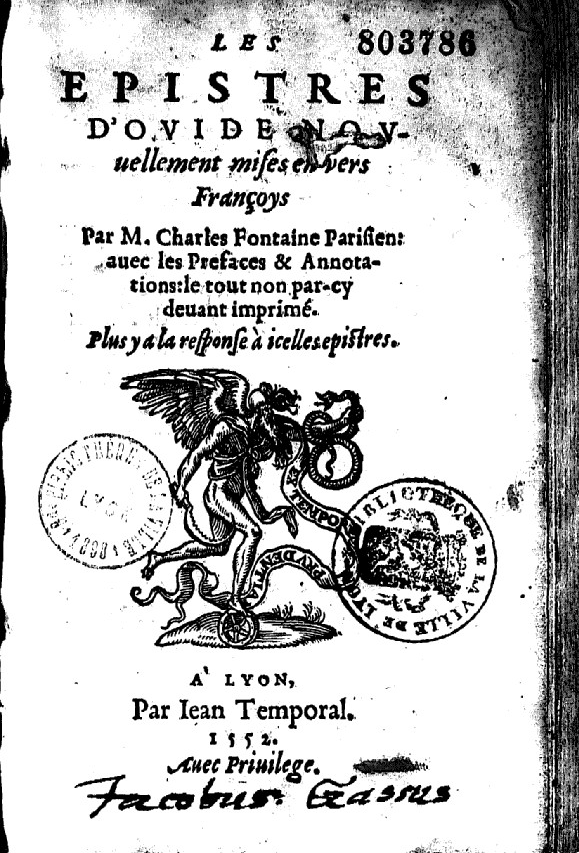 Page de garde des Epistres d'Ovide de Charles Fontaine